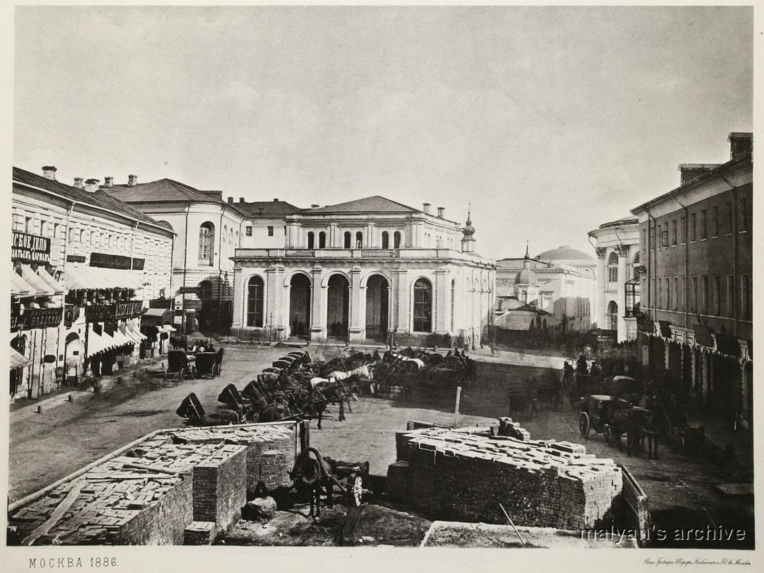 Биржа на Ильинке